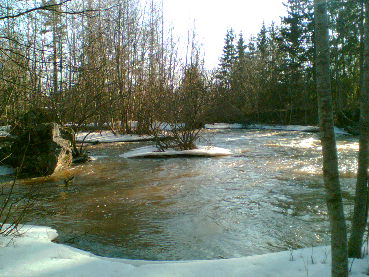 Nukari rapids [03-2007]